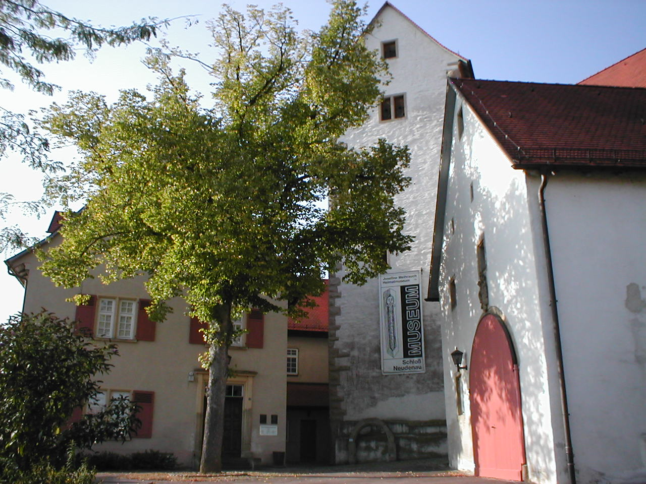 Schloss in Neudenau, Landkreis heilbronn